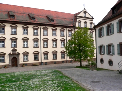 Kloster Kirchberg